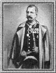 Алекса́ндр Арсе́нтьевич Болти́н (13 августа 1832, Псковская губерния — 22 апреля 1901, Одесса) — командующий легендарного пароходокорвета «Америка» (1858—1867).